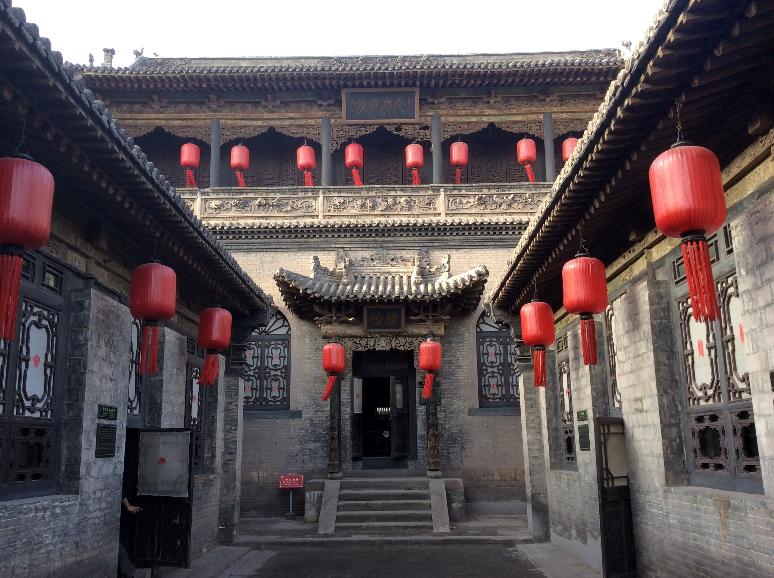 喬家大院靜宜院